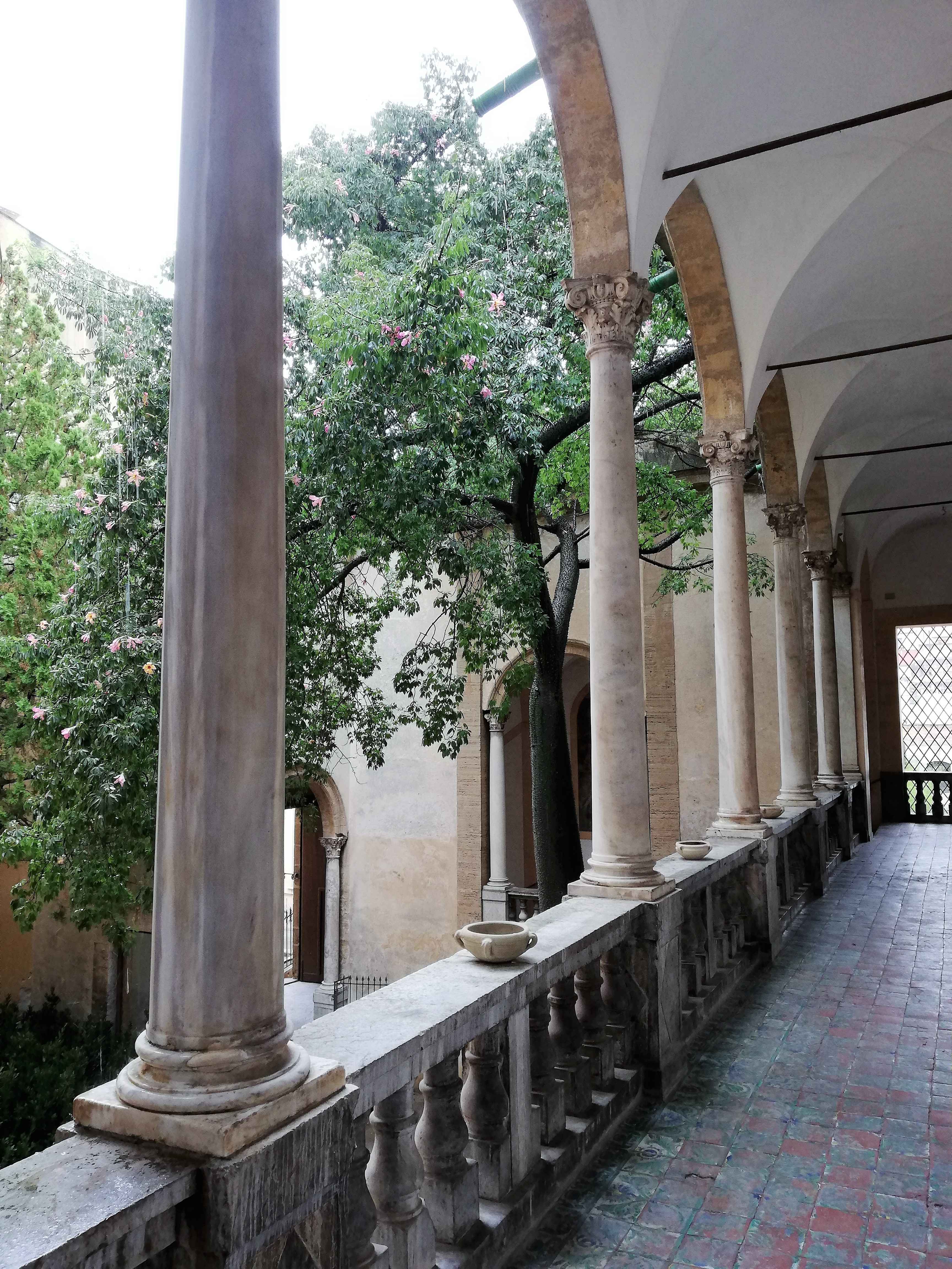 Chiostro